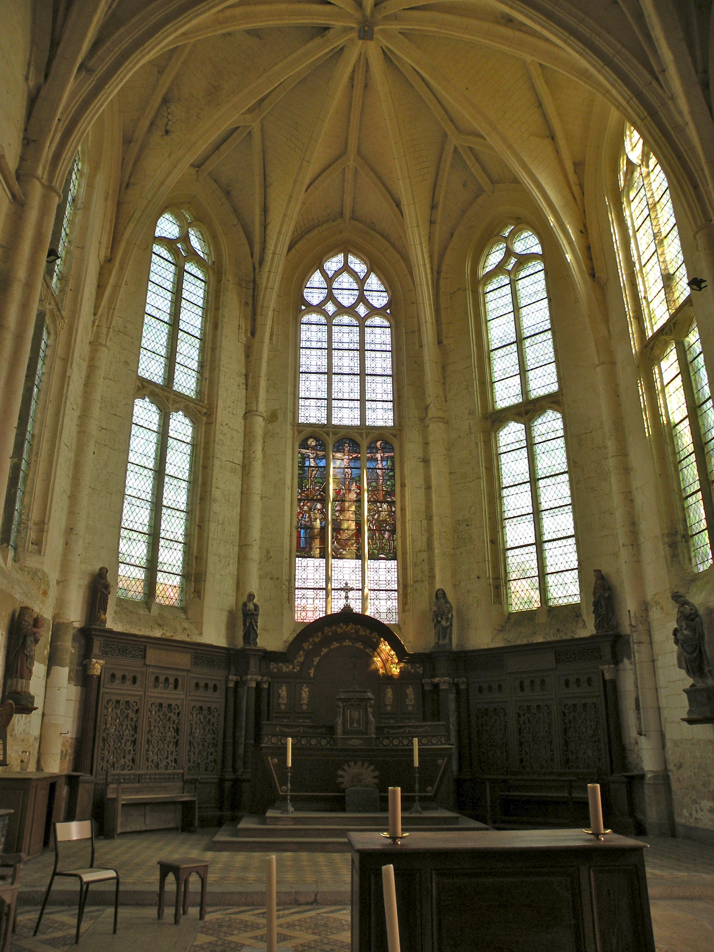 Intérieur de l'église Saint-Denis d'Hodenc-en-Bray